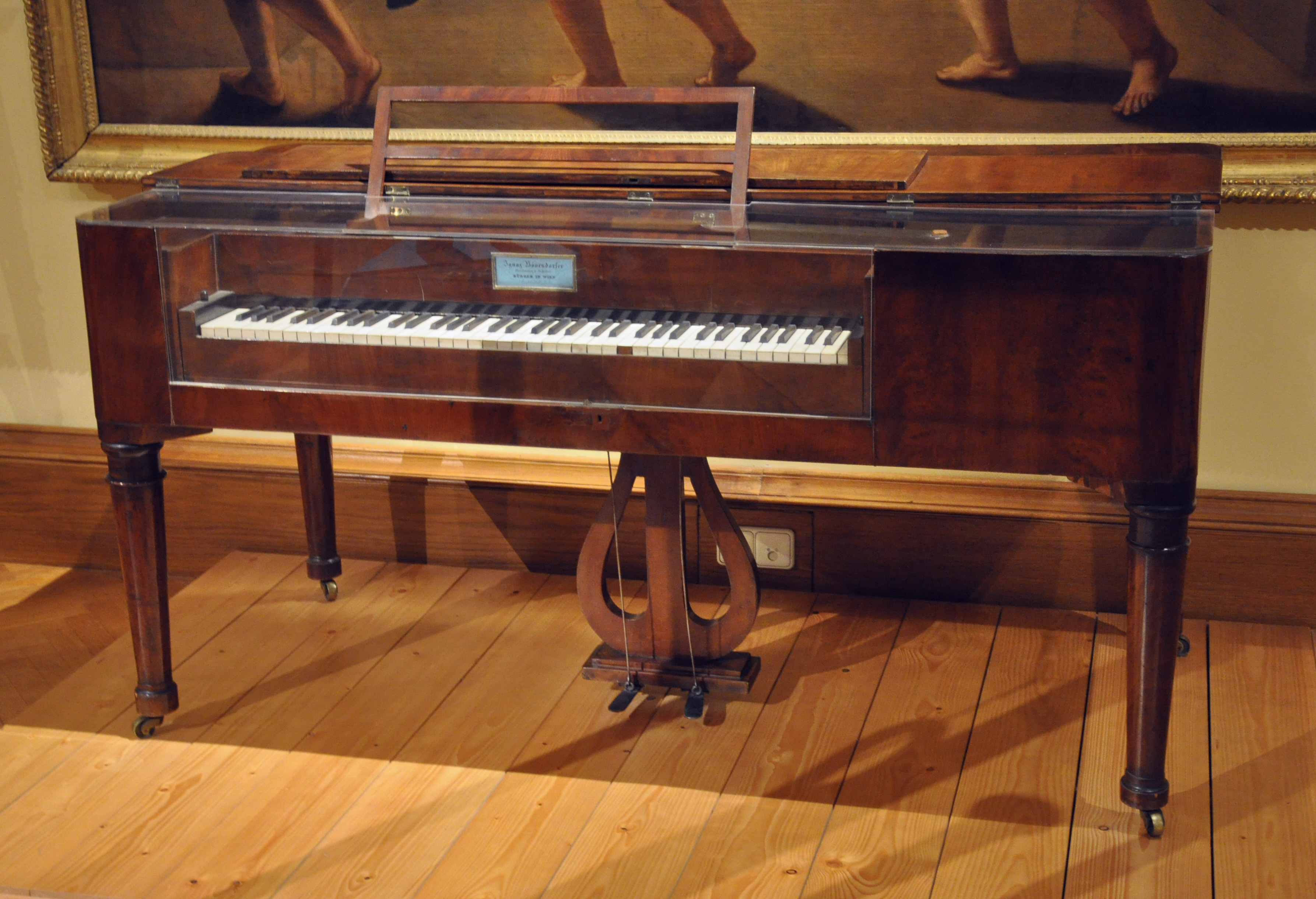 Tafelklavier, Ignaz Bösendorfer, Mahagoni furniert, Wien 1828 (das älteste erhaltene Tafelklavier der Fa. Bösendorfer) Leihgabe der Fa. Bösendorfer Wien, Kunsthistorisches Museum, Sammlung alter Musikinstrumente (Neue Burg)